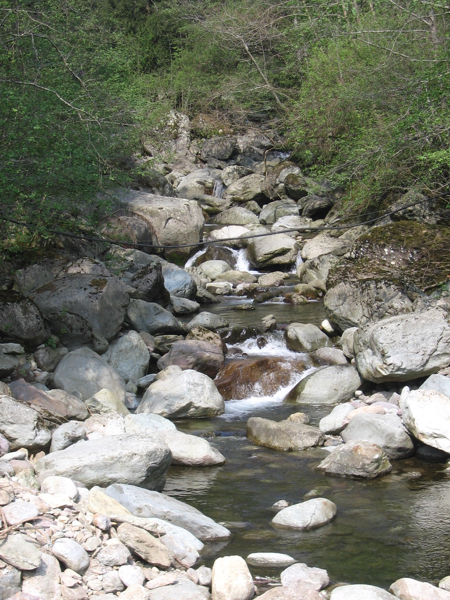 Torrente Goglio, Valgoglio, Bergamo, Italia